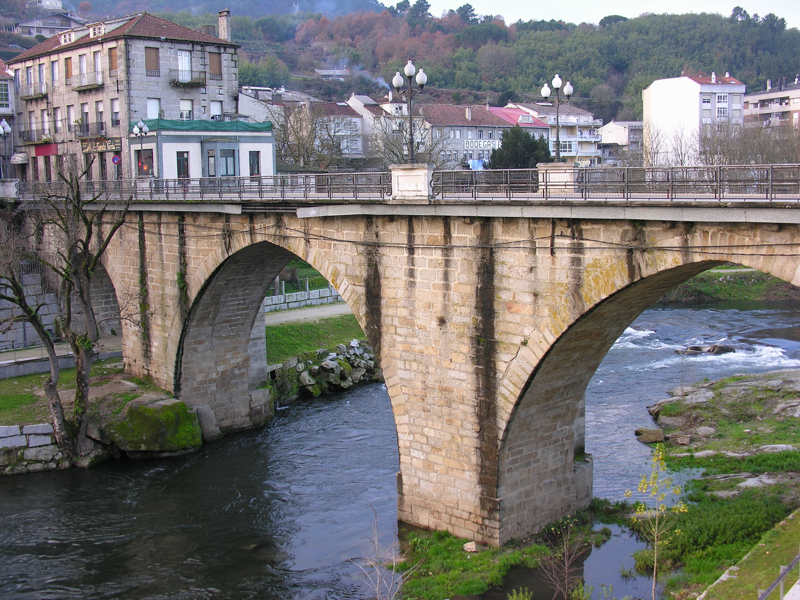 self made. Arnoia - Ribadavia - Ourense - Galicia - Spain